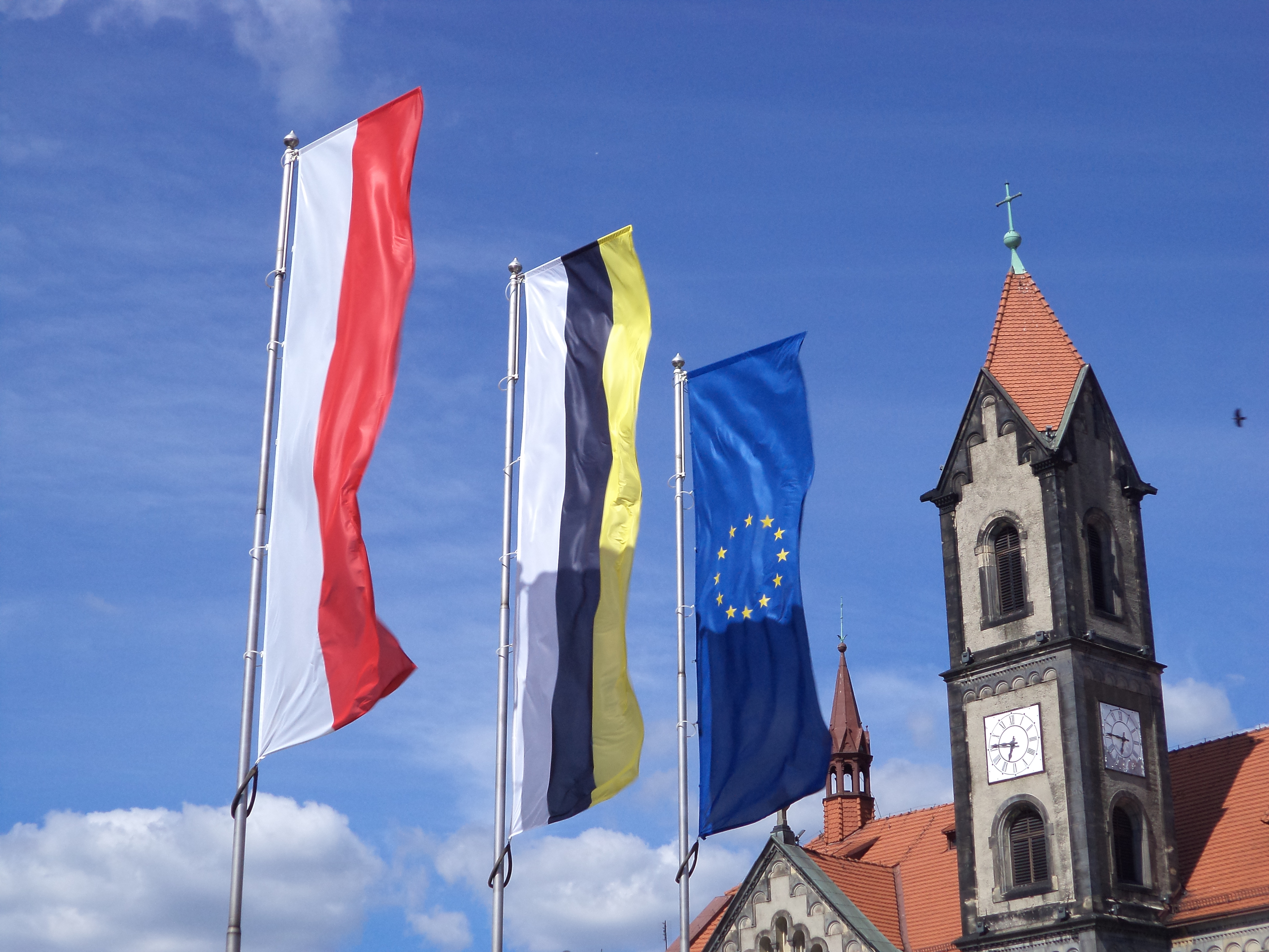 Tarnowskie Góry, Rynek. W tle kościół ewangelicki. Na pierwszym planie od lewej: flaga Rzeczypospolitej Polskiej, flaga Miasta Tarnowskie Góry, flaga Unii Europejskiej